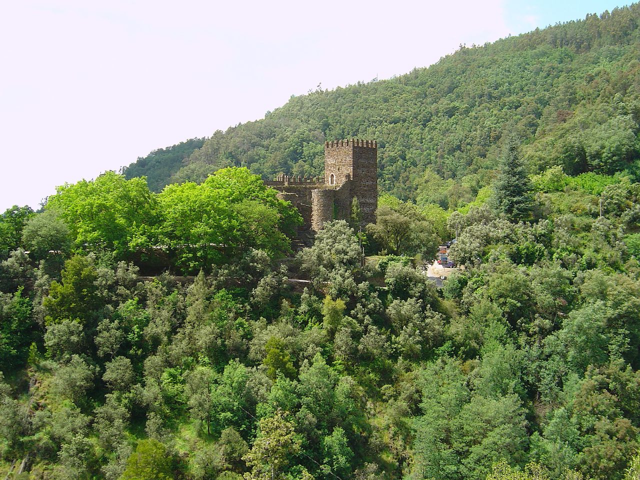 Castelo da Lousã